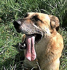 Hechelnder Hund